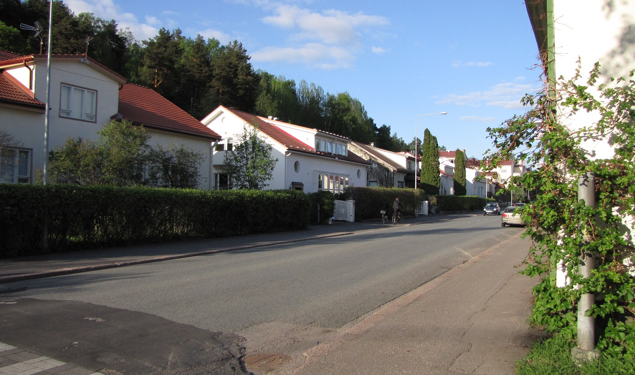 Näkymä itään Kariniemenkadulle Tarinakadulta